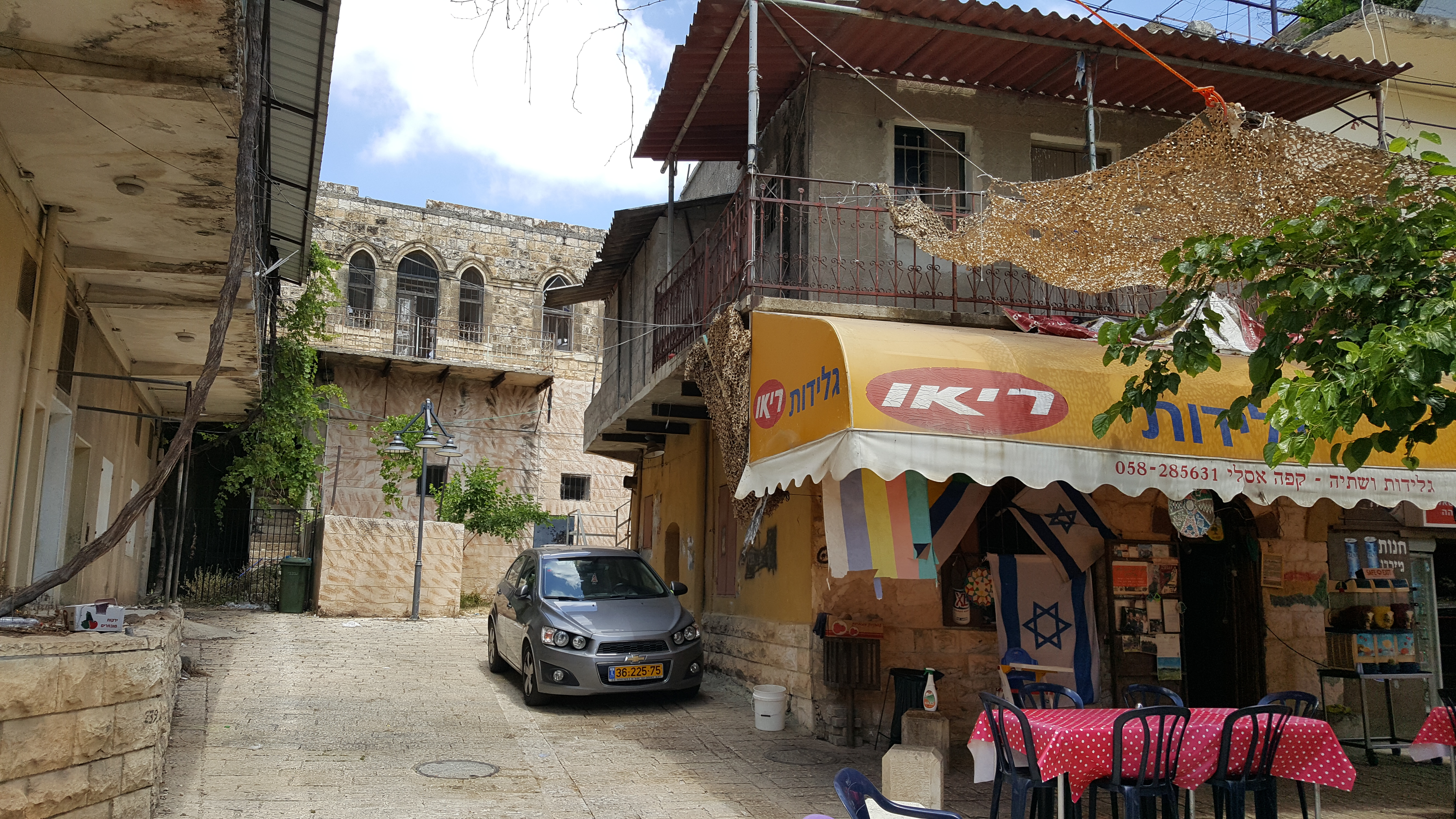 מרכז מבקרים המנוהל על ידי עמותה, ששימורו החל לפני כעשור שנים. המרכז ממוקם במבנה הקרוי "בית רחל ינאית" על שמה של רעיית נשיא מדינת ישראל לשעבר, רחל ינאית בן-צבי. תפקידו של המרכז להנציח ולשמר את מורשת יהודי פקיעין ואת מורשת משפחת זינאתי עתיקת-היומין. מרגלית זינאתי, הנצר האחרון למשפחה, מתגוררת במבנה ושומרת על בית הכנסת העתיק בפקיעין הממוקם בסמוך.